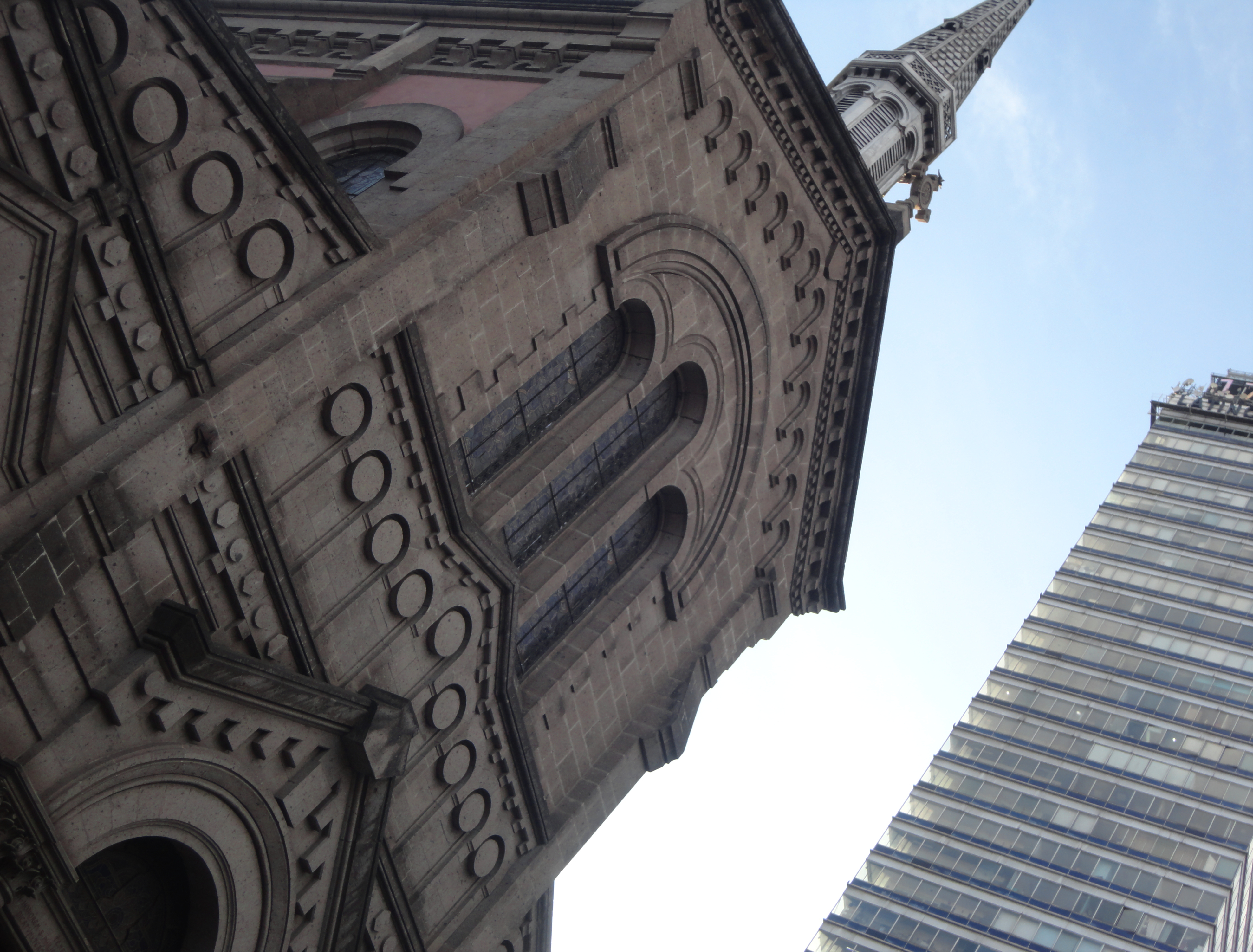 Templo Expiatorio Nacional de San Felipe de Jesús y Torre Latinoamericana